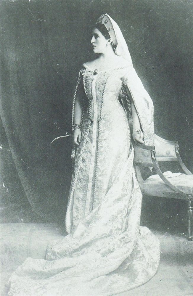 Княгиня Екатерина Николаевна Голицына, ур. Хвощинская (1876—1931)